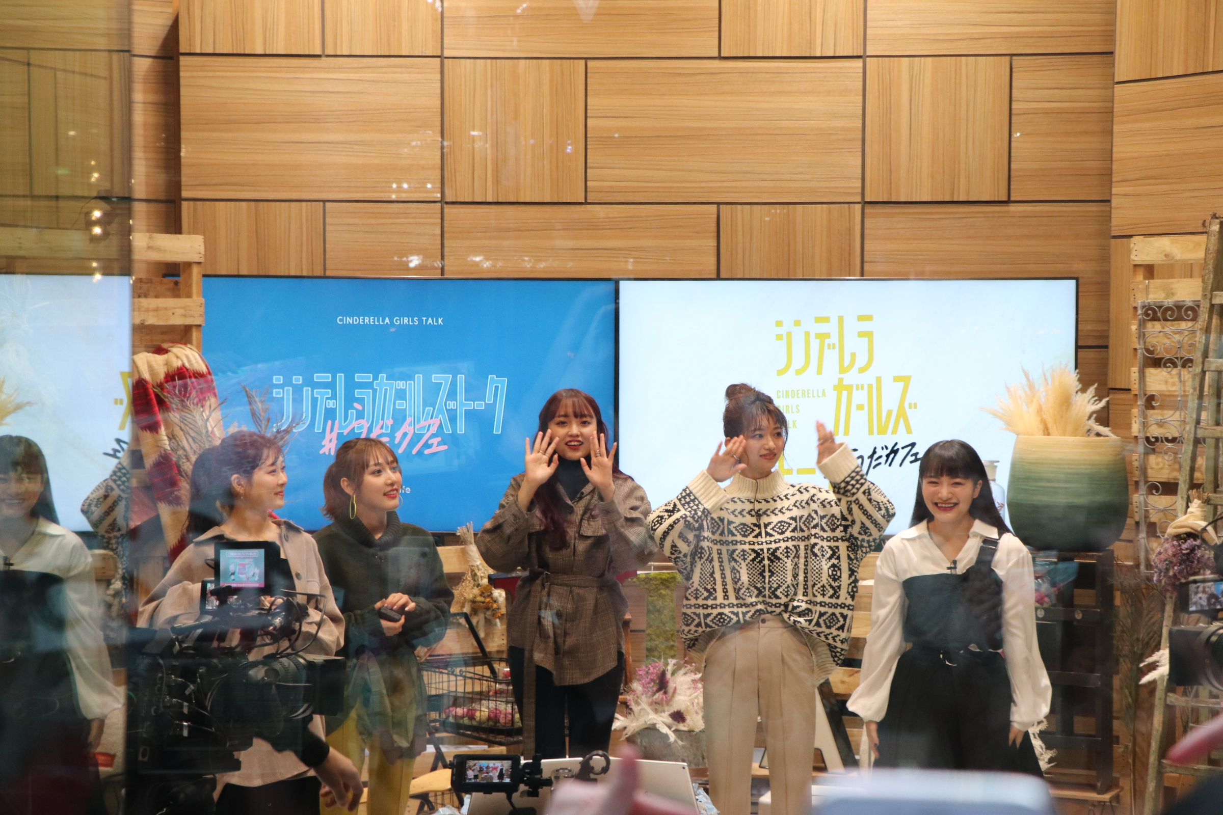 渋谷ウダガワベース